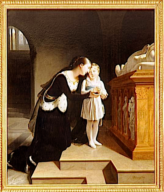 Jeanne de Navarre